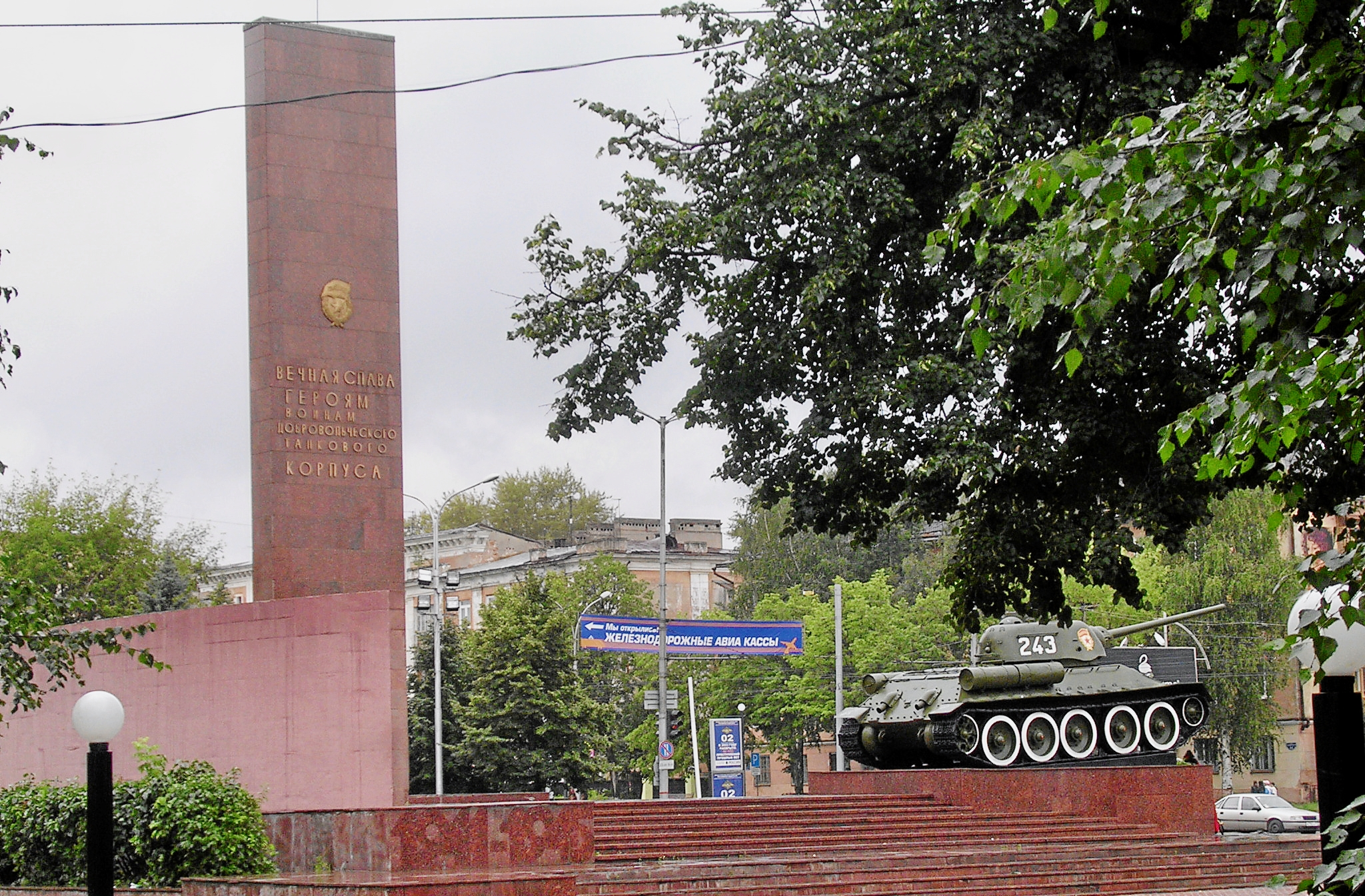 Мемориал Уральского добровольческого танкового корпуса в Перми